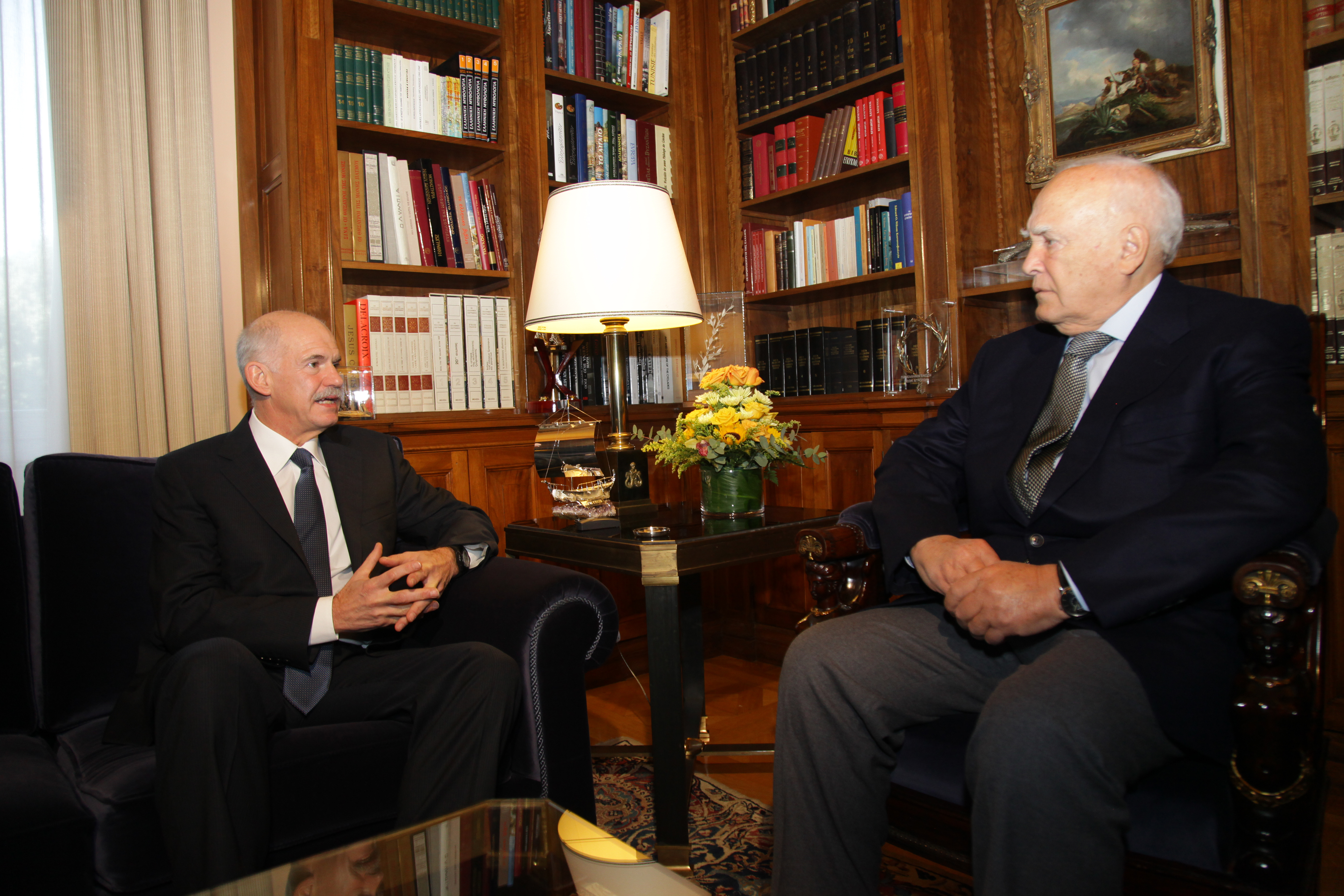 Συνάντηση με τον Πρόεδρο της Δημοκρατίας, Κάρολο Παπούλια Προεδρικό Μέγαρο 5 Νοεμβρίου, 2011